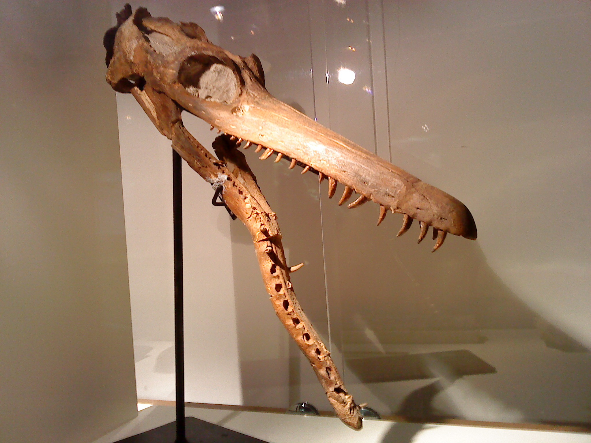 Crâne d'un pliosaurus du muséum de Nancy (Meurthe-et-Moselle, France).